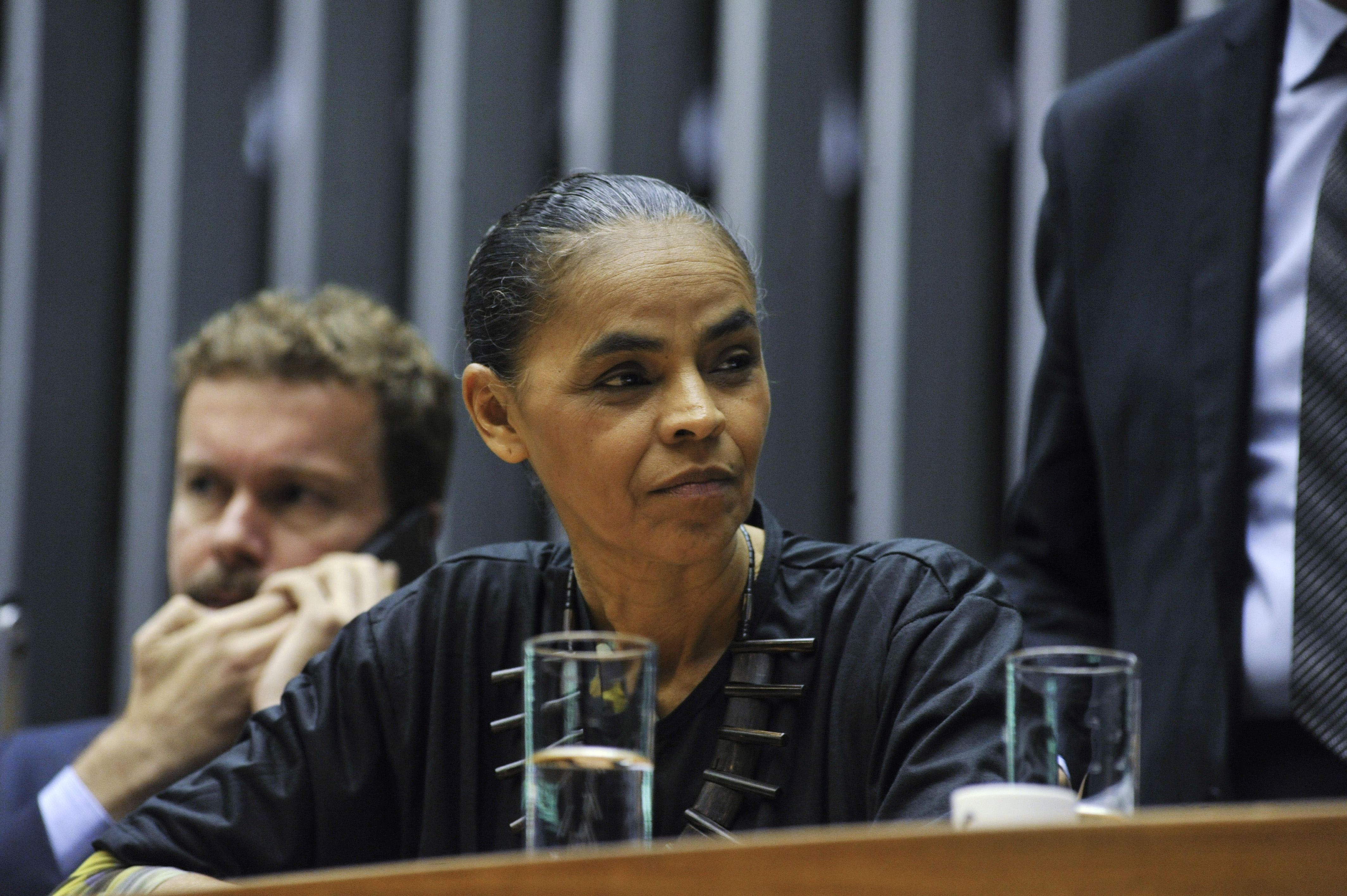 Plenário da Câmara dos Deputados durante sessão solene em homenagem ao Dia do Índio, comemorado em 19 de Abril. Desde terça-feira (14), quando deram início ao Acampamento Terra Livre, as lideranças indígenas cumprem agenda no Parlamento onde apresentam suas reivindicações. ex-senadora e ambientalista, Marina Silva. Foto: Geraldo Magela/Agência Senado